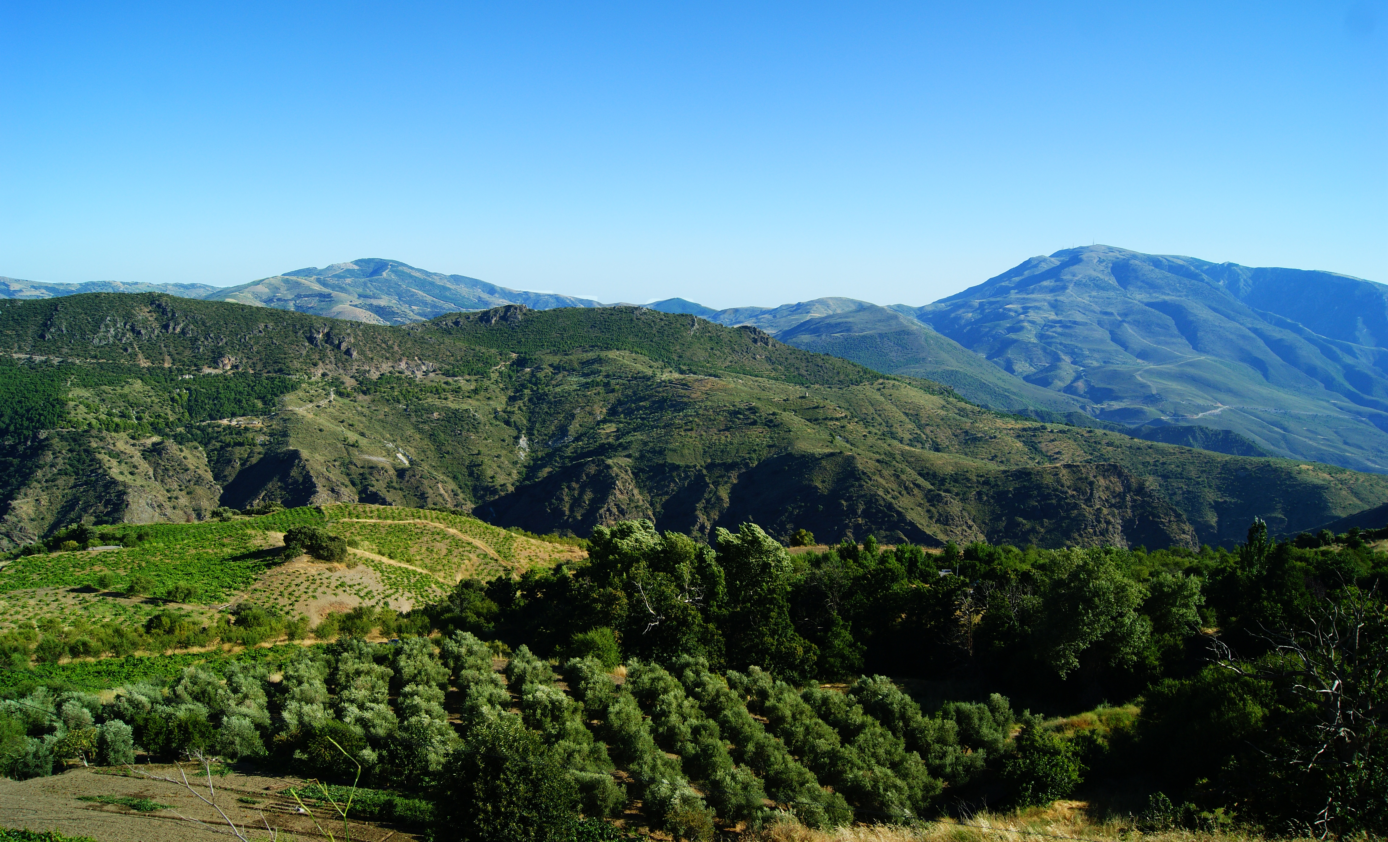 Sierra de Lújar